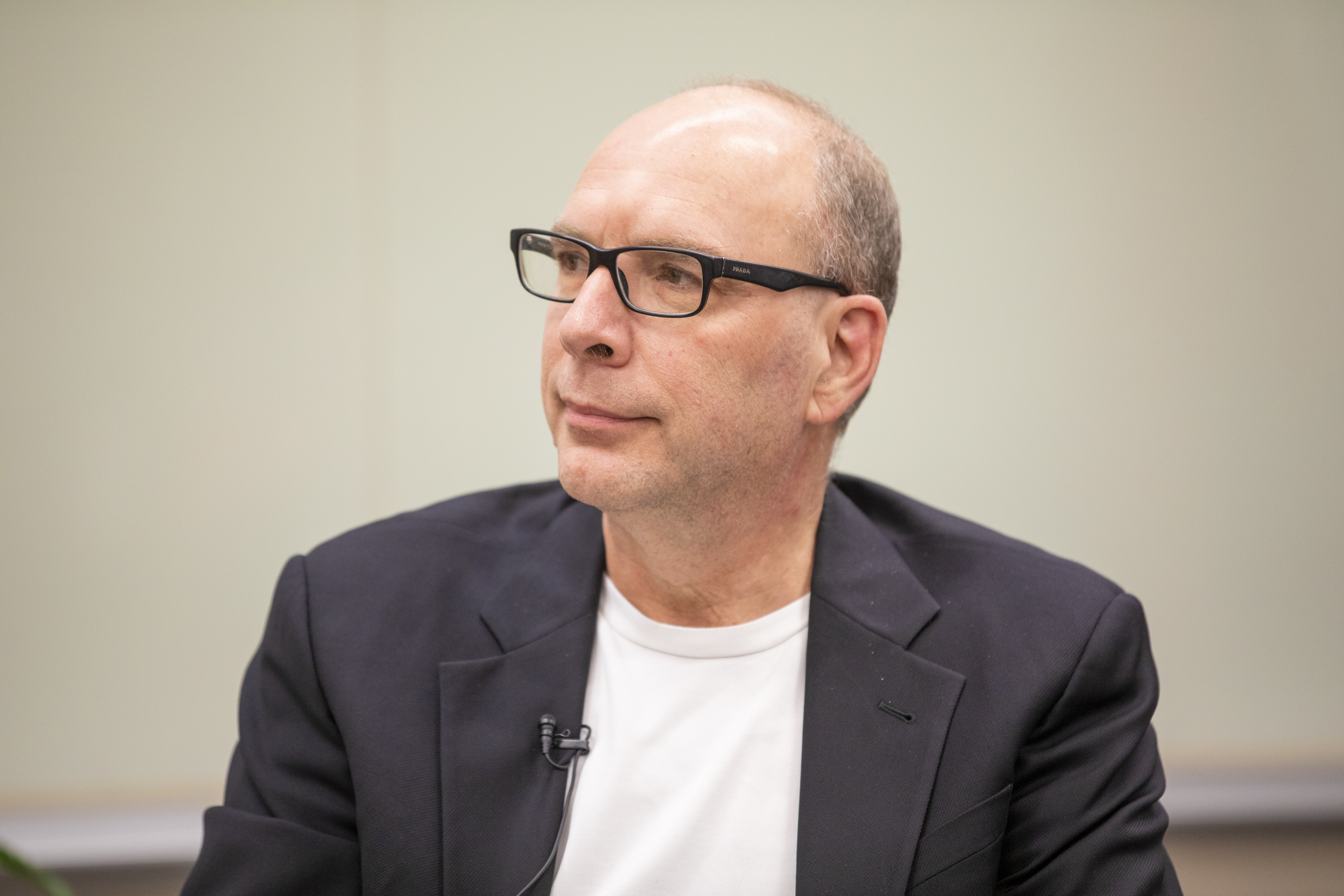 482A9951